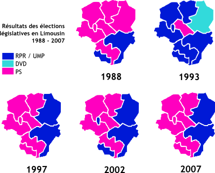 Carte des circonscriptions électorales du Limousin. Évolution selon les élections législatives de 1988 à 2007.